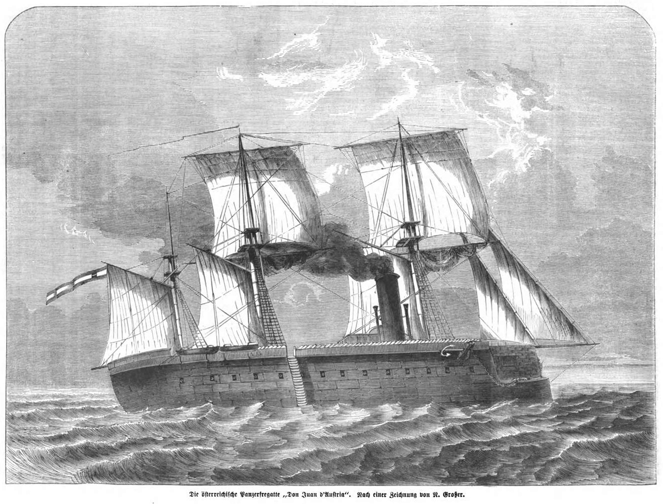 Die österreichische Panzerfregatte "Don Juan d'Austria", 1864.